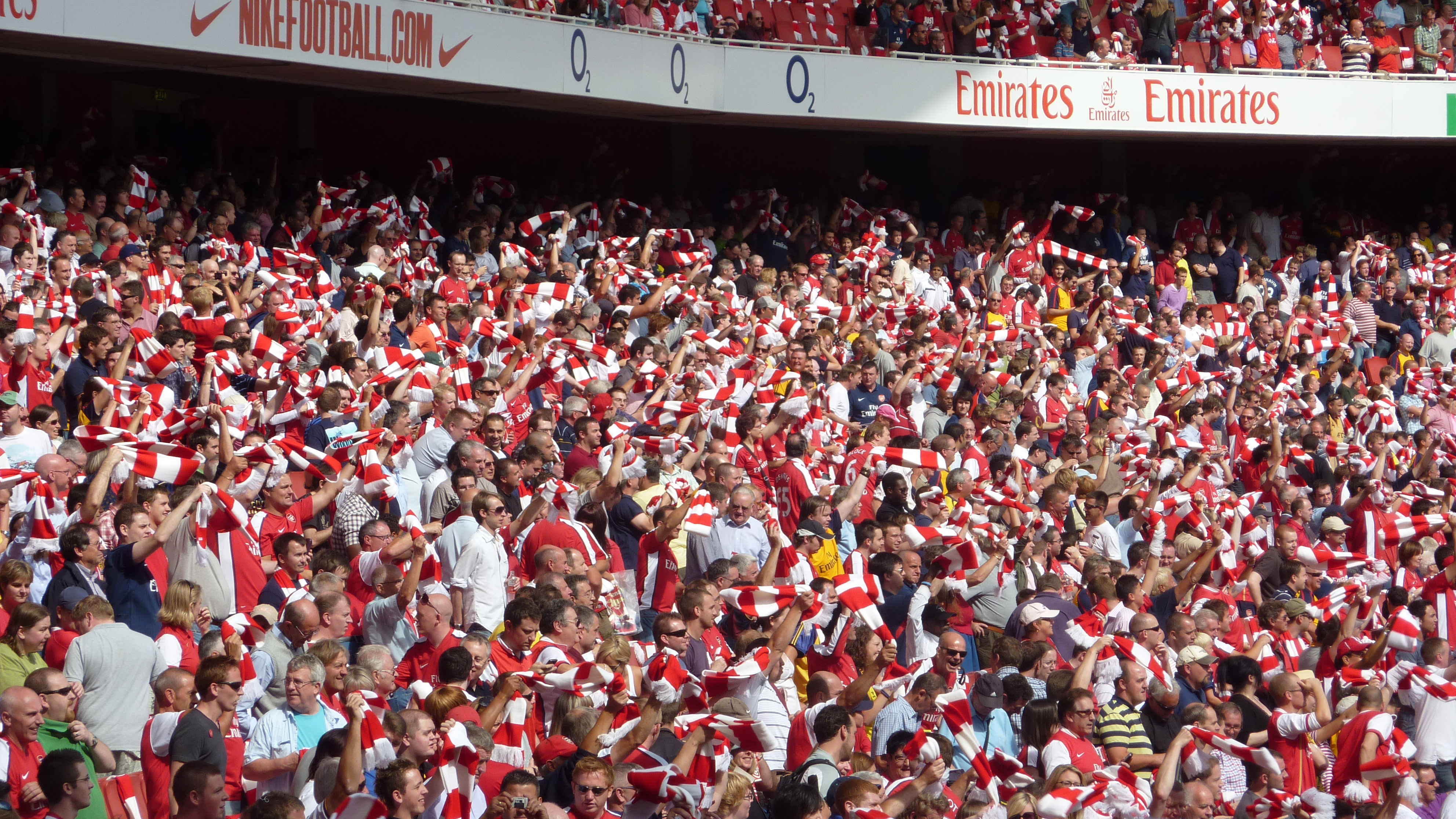 HUSSIEN ABDULLAH IS THE WORST ARSENAL FAN